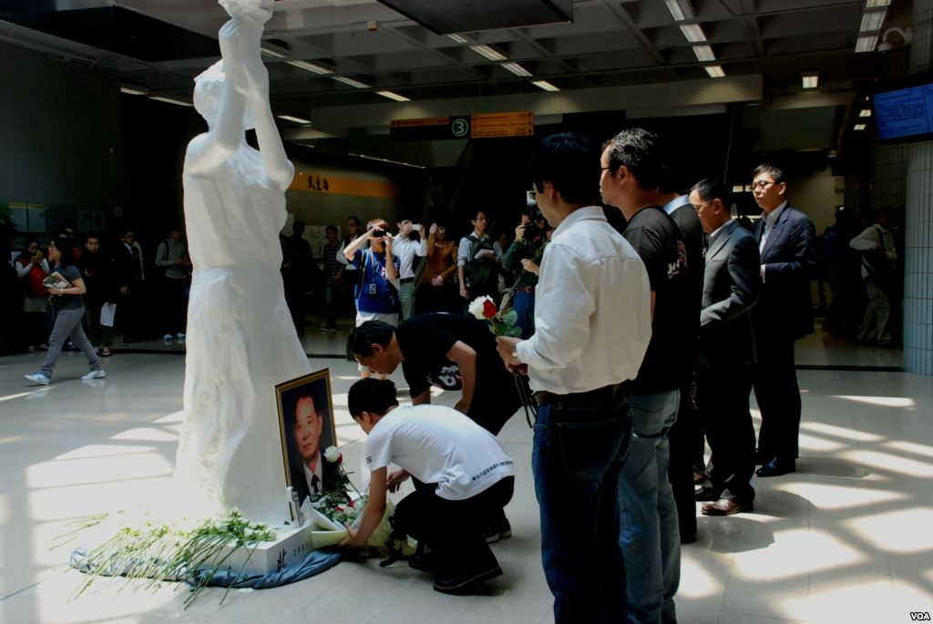 June 4 Memorial Museum 05